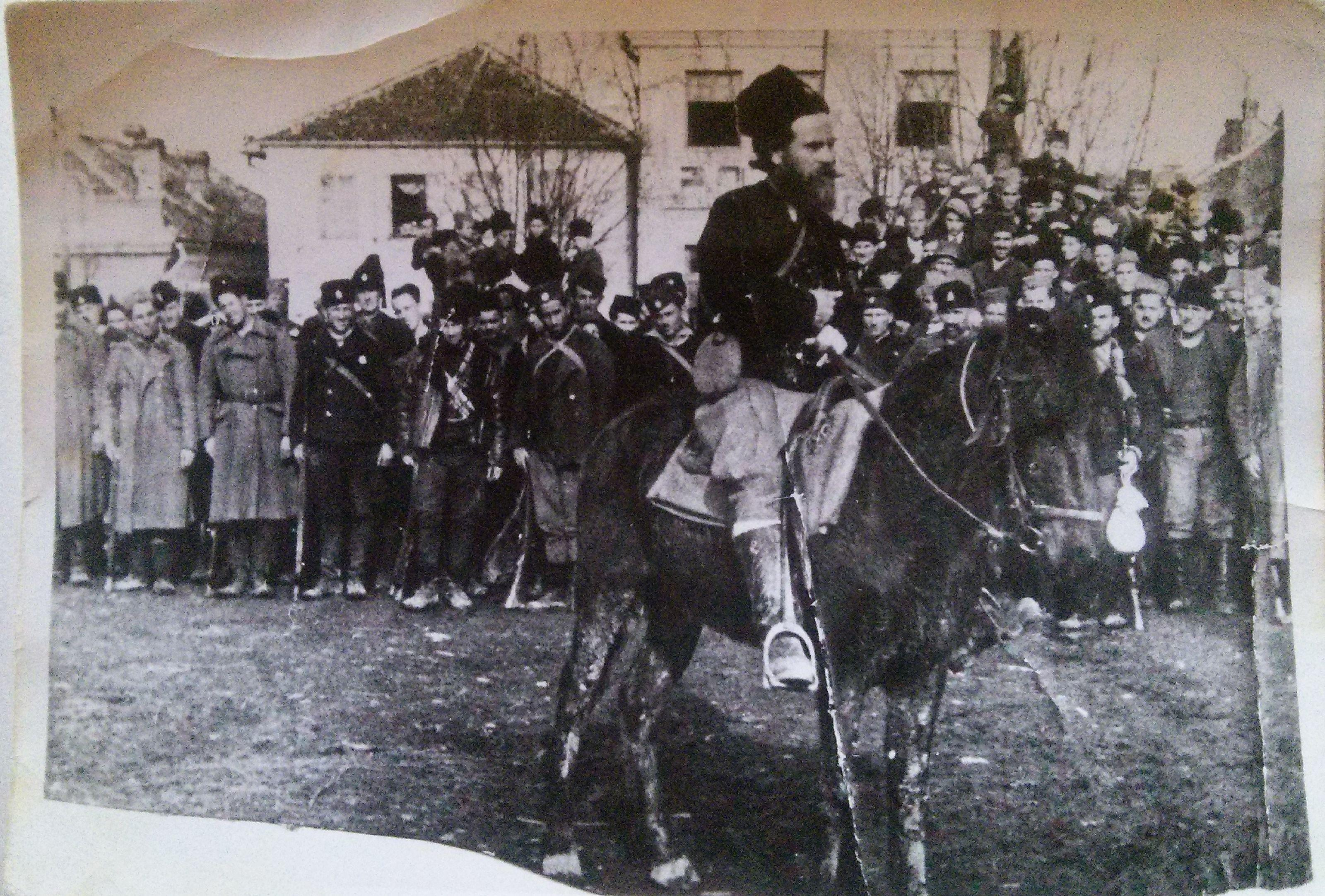 Srpski (latinica): Cetnicki vojvoda Budimir Bosiljcic ispred odreda na Ubu